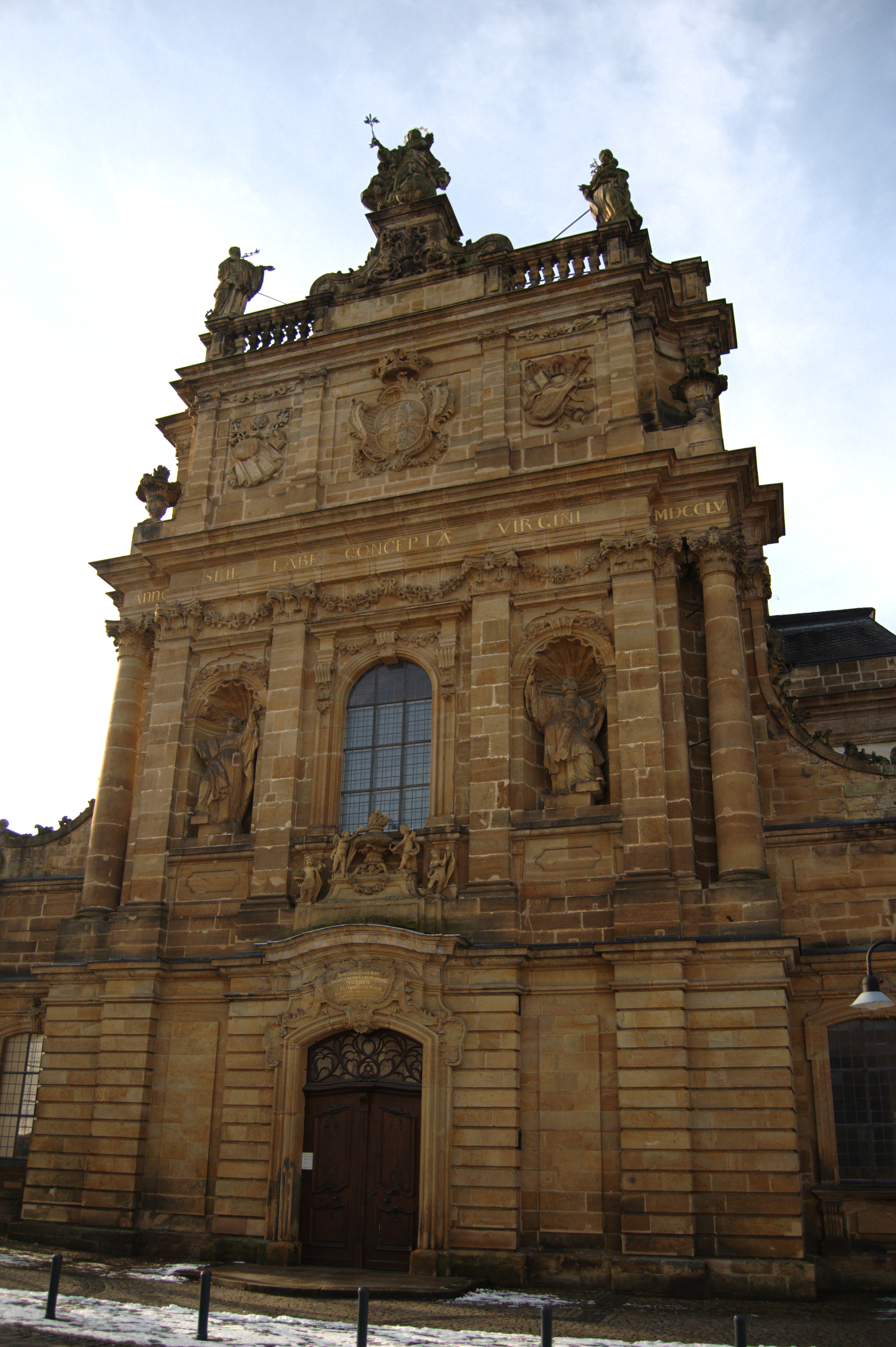 Ansicht des Ostportals der Kirche Maria Immaculata in Büren, Westfalen